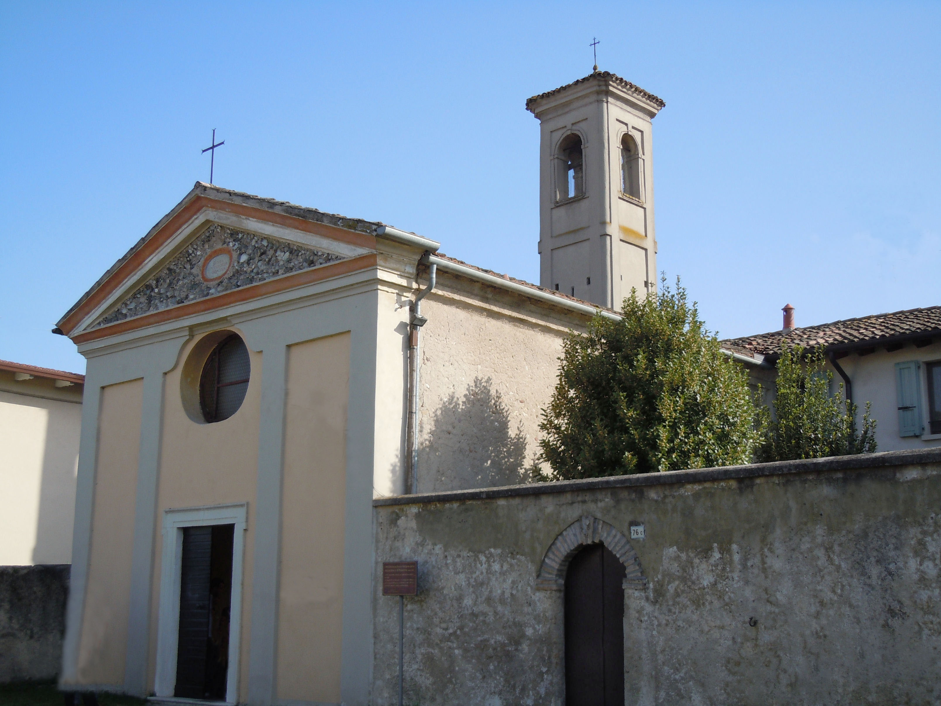 Castiglione delle Stiviere: chiesa della Palazzina (o di Palazzina), indicativo del rione Palazzina, dedicata alla Beata Vergine della Visitazione.